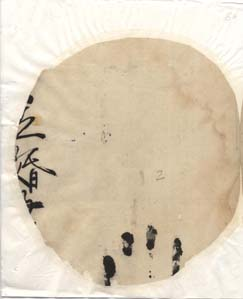 明万历十六年（1588年）十二月所立的童养媳婚书。